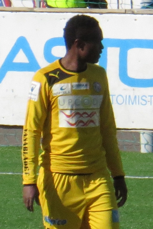 Clifton Miheso, kenialainen jalkapalloilija Vaasan Palloseuran joukkueessa kaudella 2015.